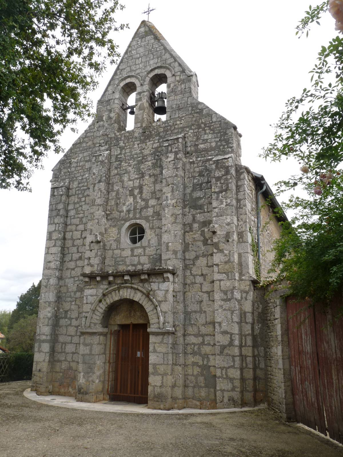 église des Adjots, Charente, France